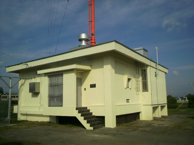 NHK島立ラジオ放送所の左側正面（建物入口側）